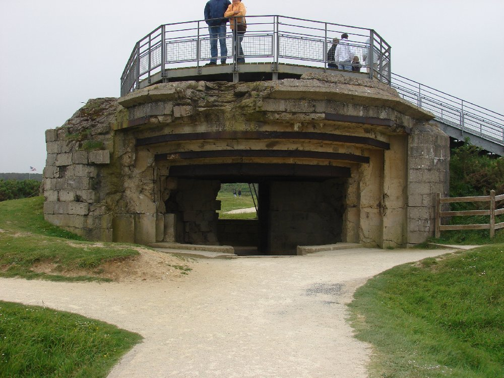 Umas das casamatas em Pointe du Hoc